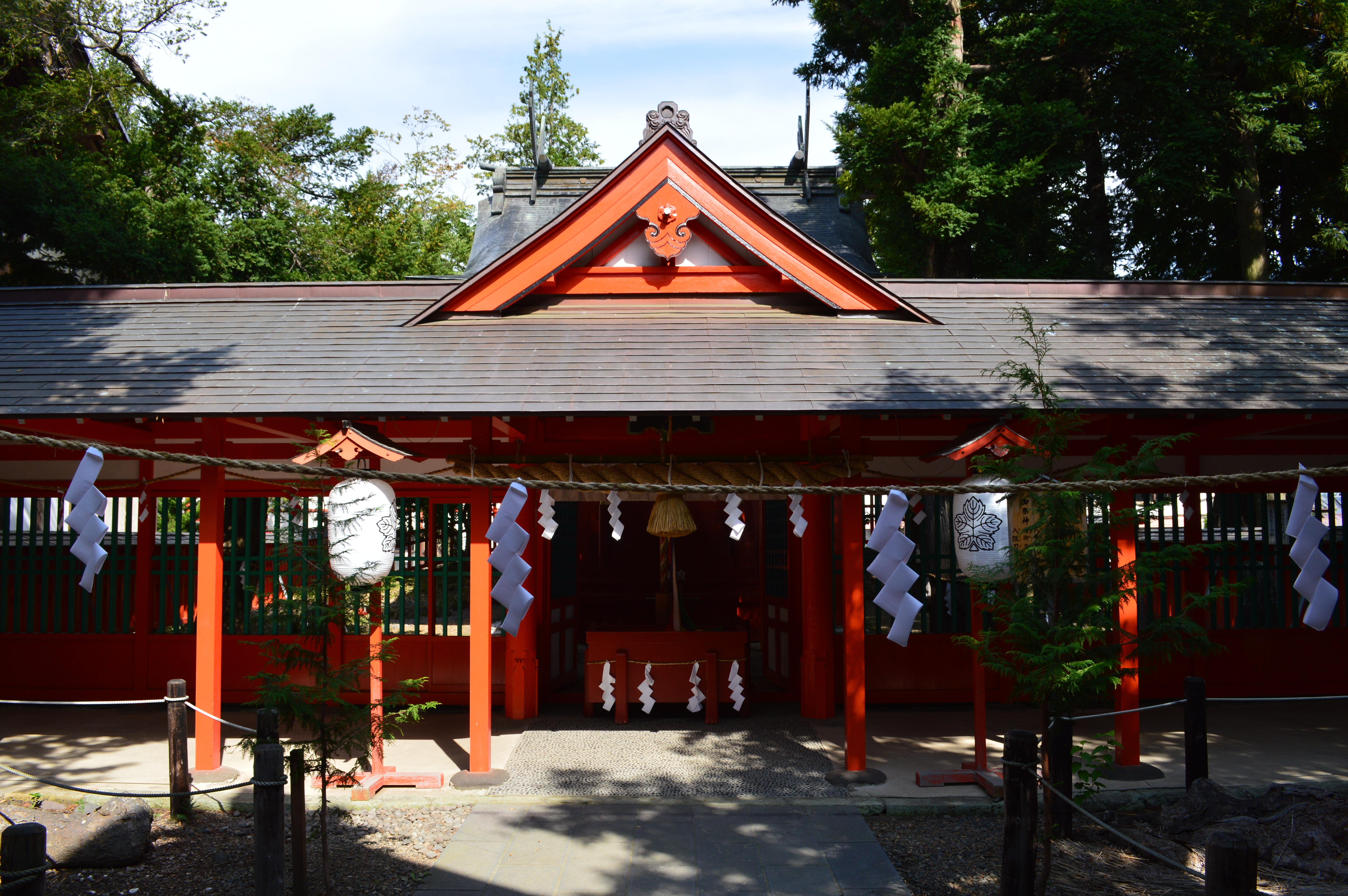 諏訪神社 (生島足島神社摂社) 正面